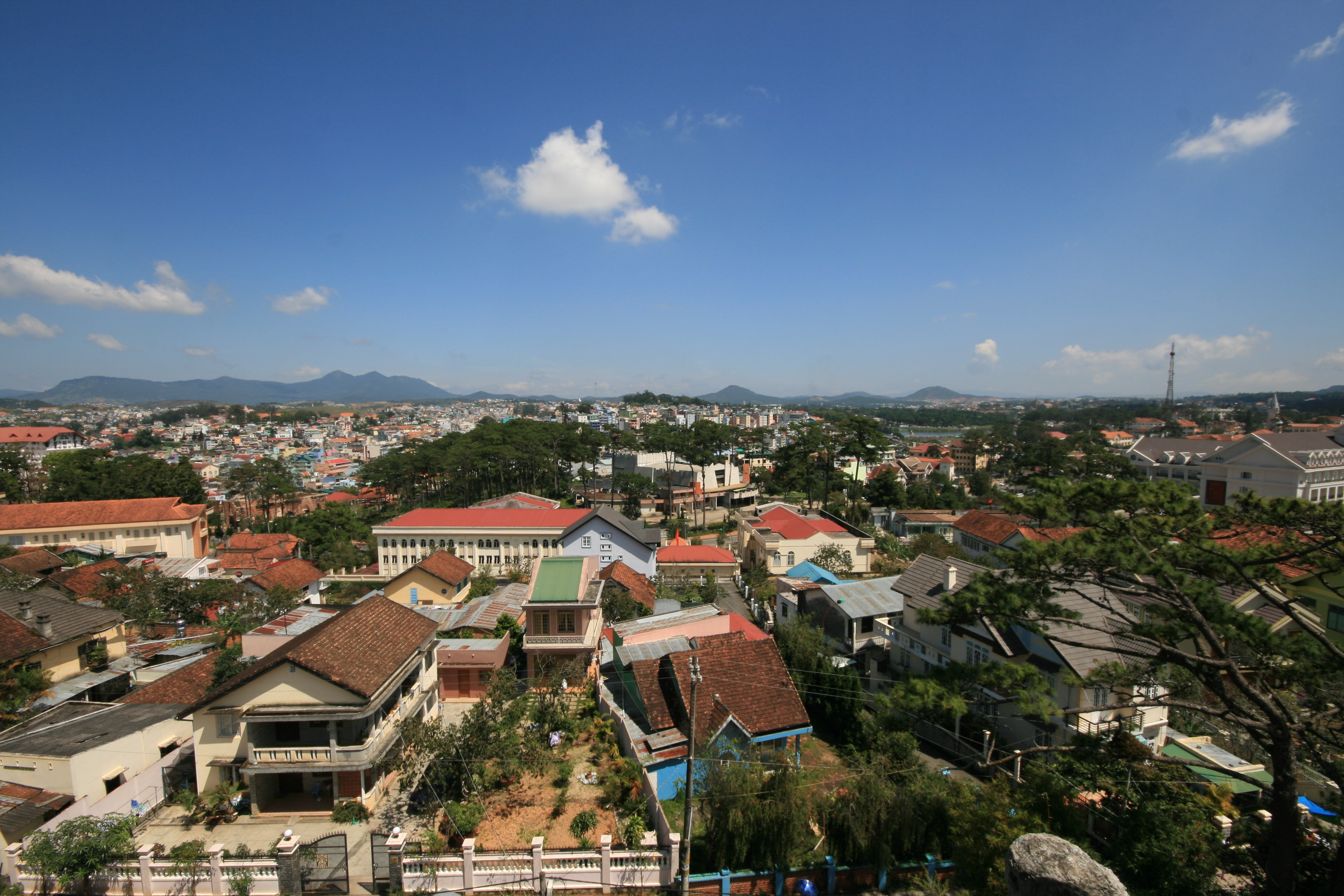 Da Lat